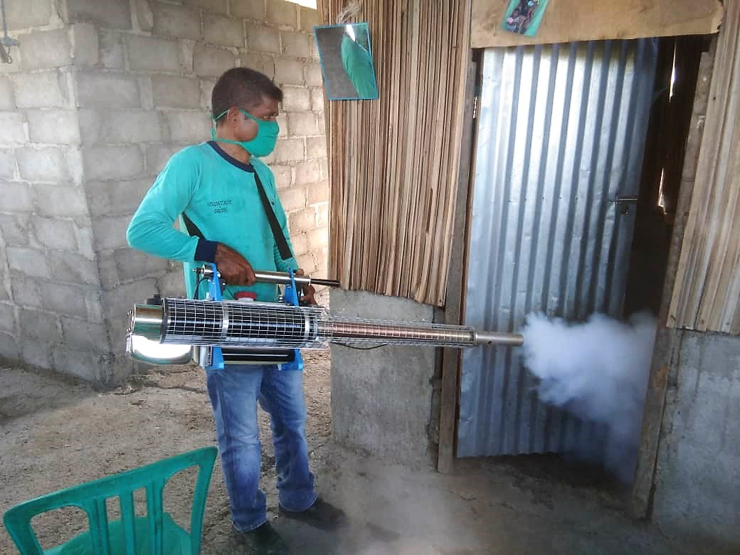 Moskitobekämpfung zur Eindämmung des Denguefiebers in Uma Boco, Osttimor